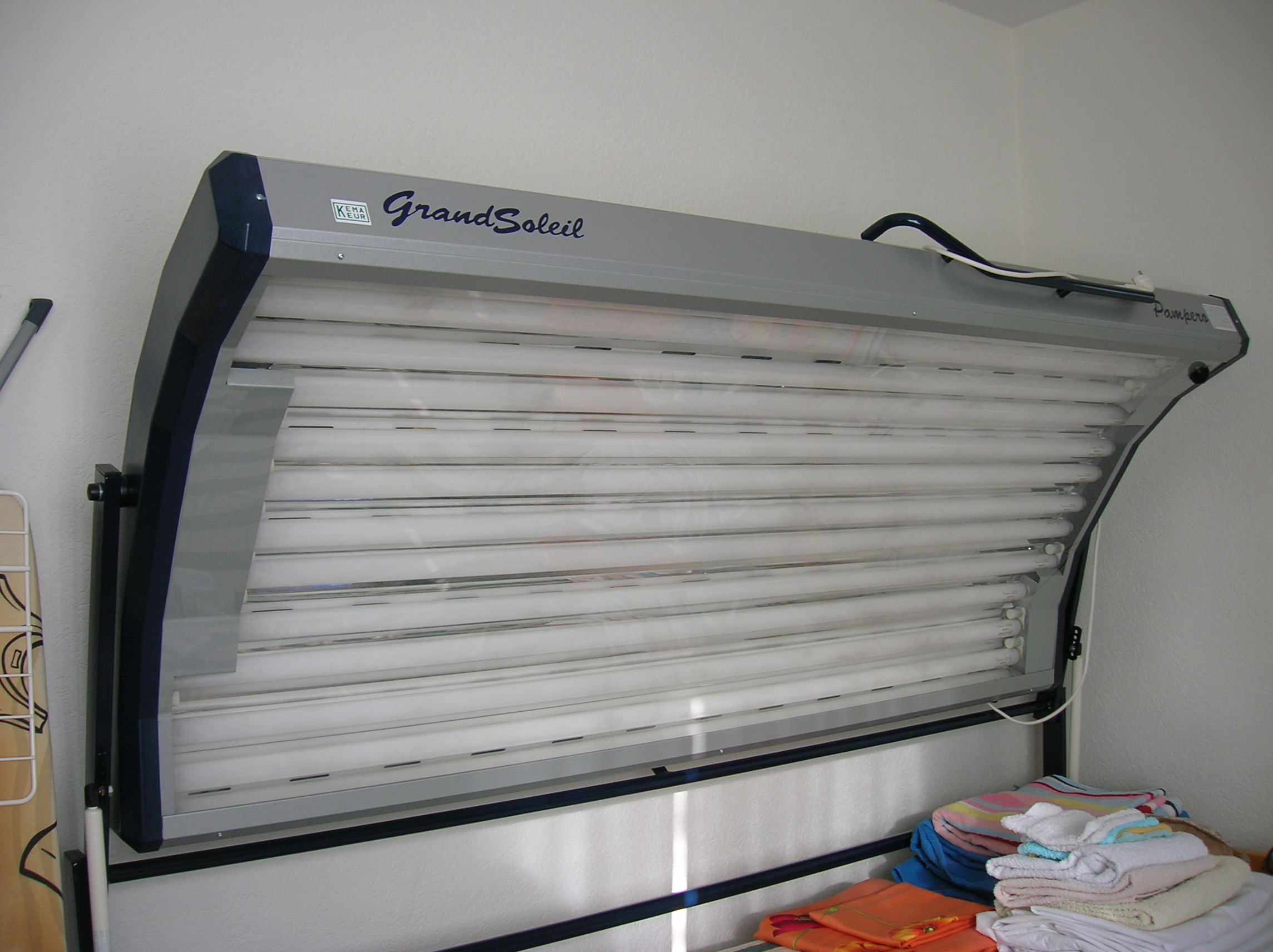 Zelfgemaakte foto, 11 juli 2006: een zonnehemel (d.w.z. een ééndelige zonnebank).